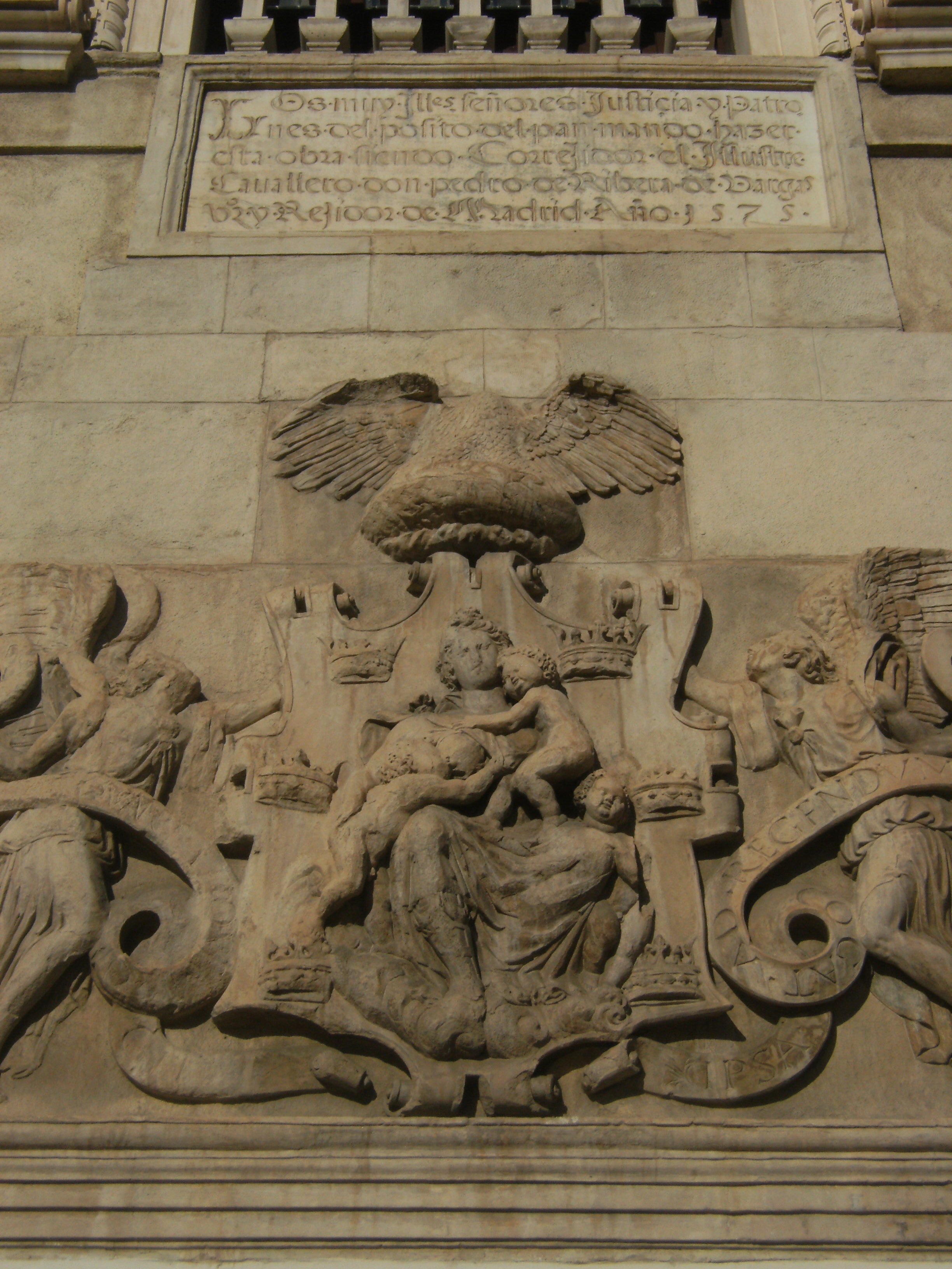 Relieve de la Matrona de Murcia o del Pósito del Trigo, del siglo XVI. Palacio Almudí de Murcia (España)